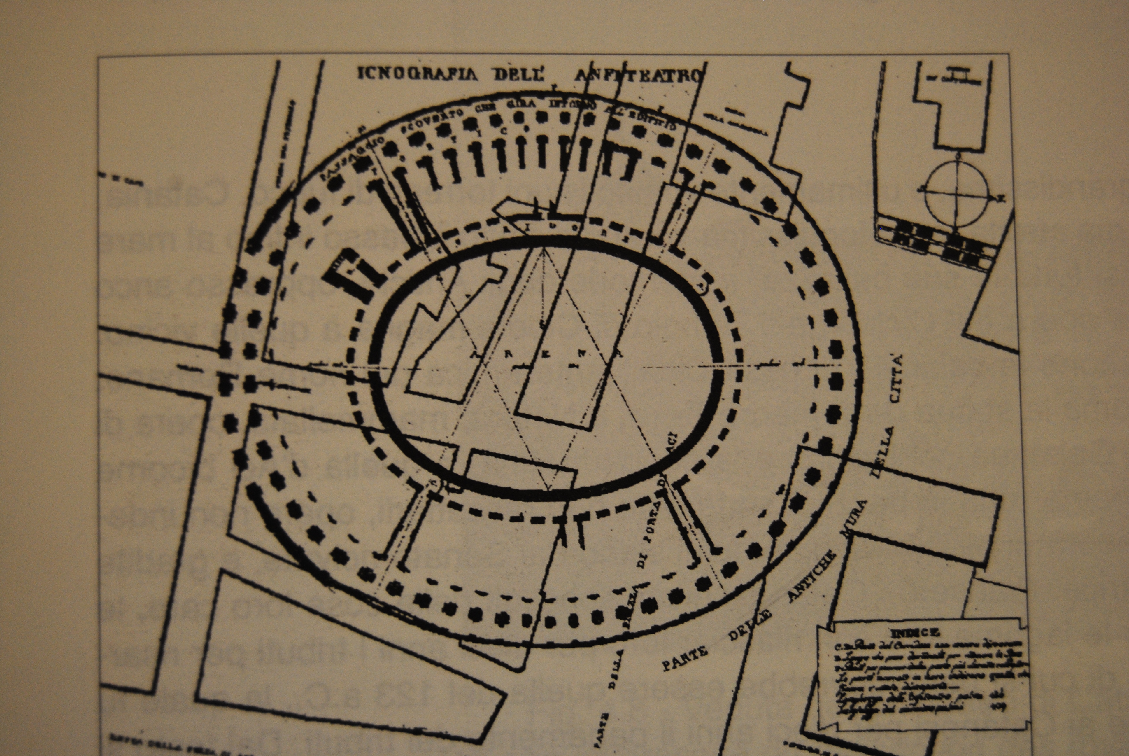 Planimetria dell'Anfiteatro romano di Catania in una restituzione grafica pubblicata in F. DE ROBERTO, Catania, Istituto italiano di Arti Grafiche, Bergamo 1907